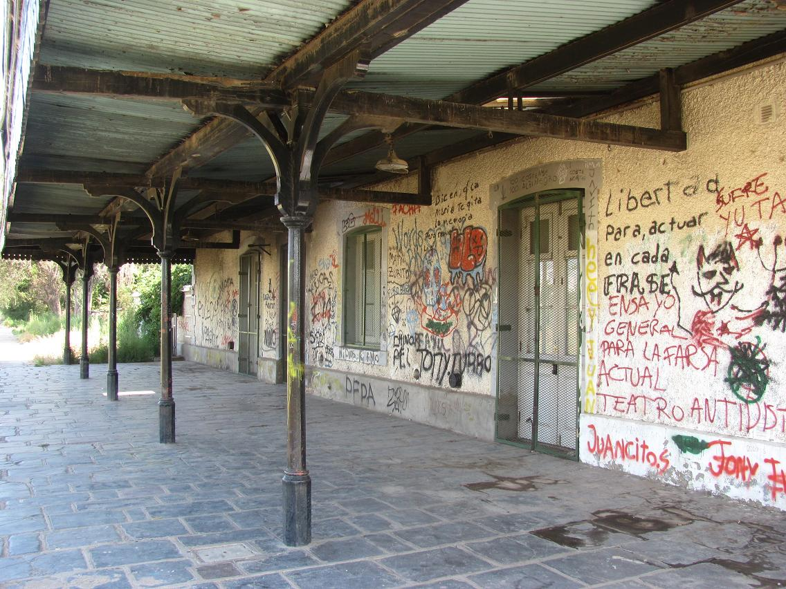 Estación Cipolletti Vandalizada